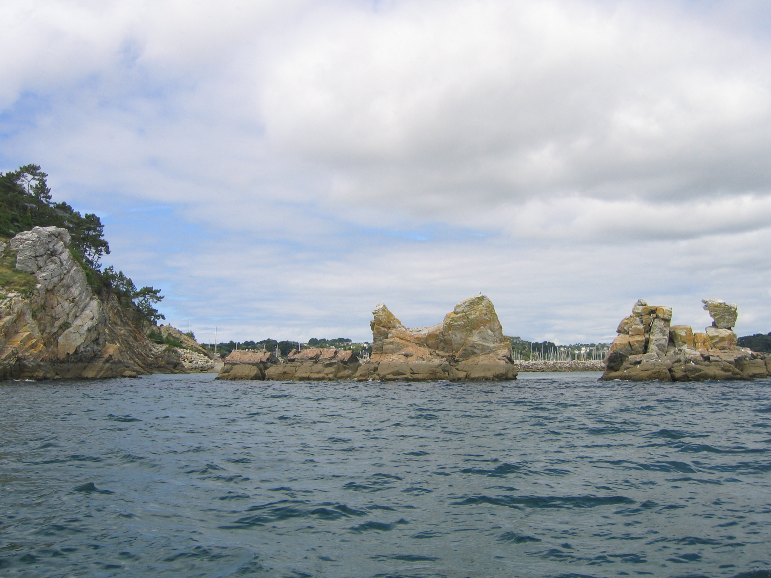 Visite en bateau des grottes de Morgat.